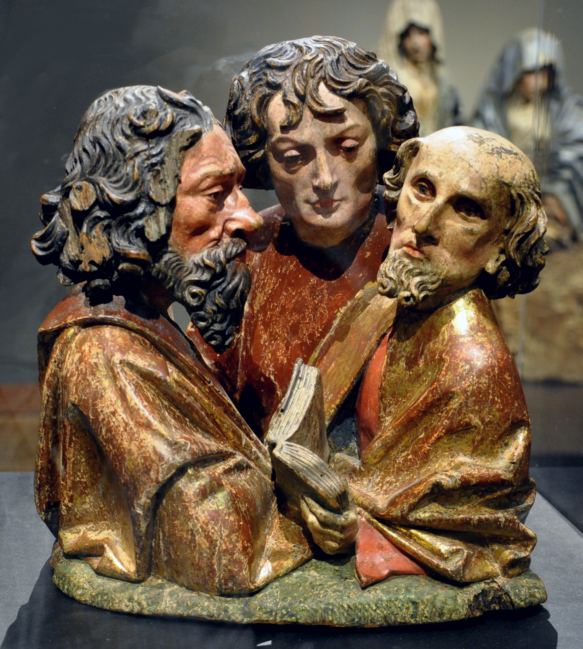 Büsten dreier Apostel, Oberrhein um 1490, Nussbaumholz, originale Farbfassung Liebieghaus, Frankfurt am Main, Inv. Nr. St. P. 569